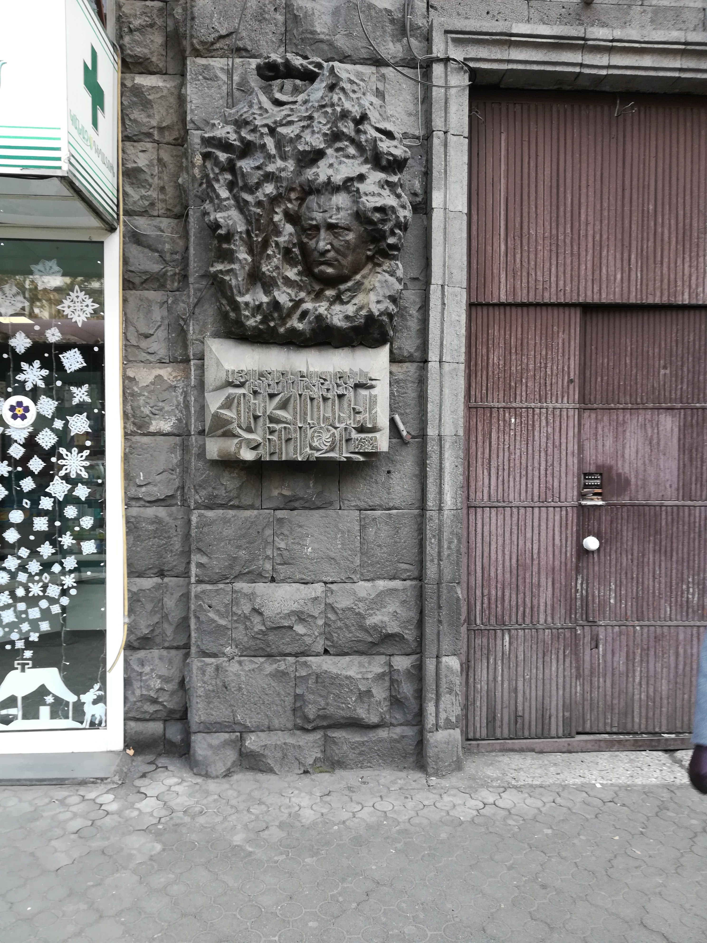 Ереван